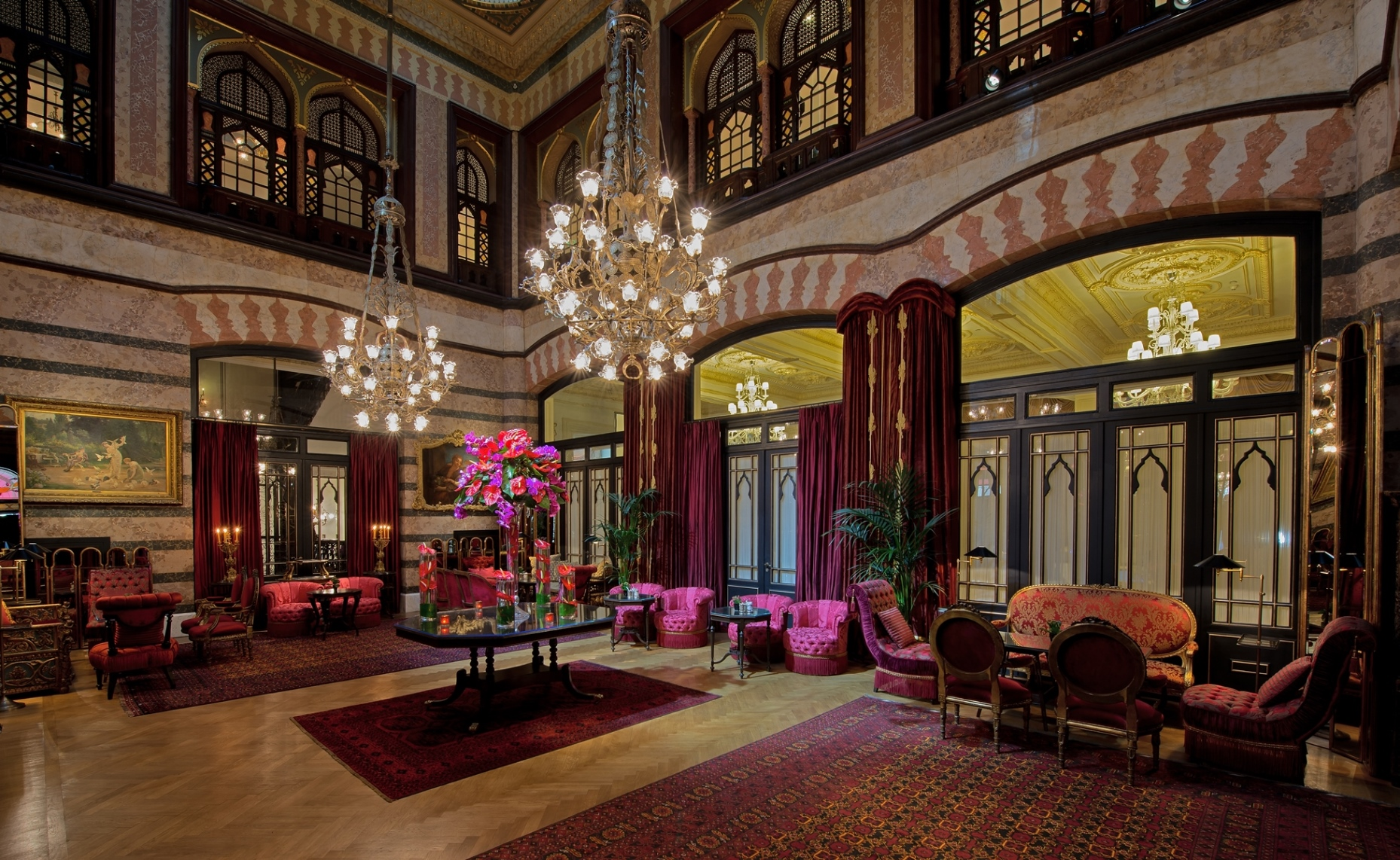 Kubbeli Saloon